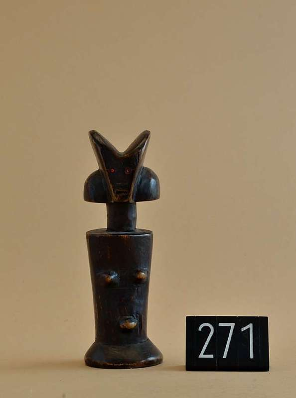 BAMBOLA MWANA HITI - Figura antropomorfa in cui si rappresenta solo la parte superiore del corpo (un tronco di cono poggiante su una base circolare). In evidenza sono le protuberanze dei seni e dell'ombelico, così come le incisioni curvilinee sul ventre. Le spalle sono rese attraverso un piano circolare da cui parte il volume cilindrico del collo. Il volto è di forma triangolare, le orecchie sporgenti, l'acconciatura bilobata, gli occhi resi da due perline rosse. Le figure mwana hiti (""bambini di legno"") vengono create in occasione dei riti d'iniziazione femminili. Come riferisce Felix le statuine sono attivate attraverso sacrifici e mettendole vicine alle figure degli antenati del clan paterno Le ragazze trattano le statuine come se fossero bambini vestendole e agghindandole, lavandole e nutrendole e danzano con esse all'uscita del campo di iniziazione. Togliendo alla statuina ogni ornamento e mettendola in una zucca, la si disattiva. Una donna che non può avere figli ""adotterà"" la statuina. Il termine ""bambola"" può quindi essere sviante: non si tratta di giocattoli quanto di oggetti simbolici.